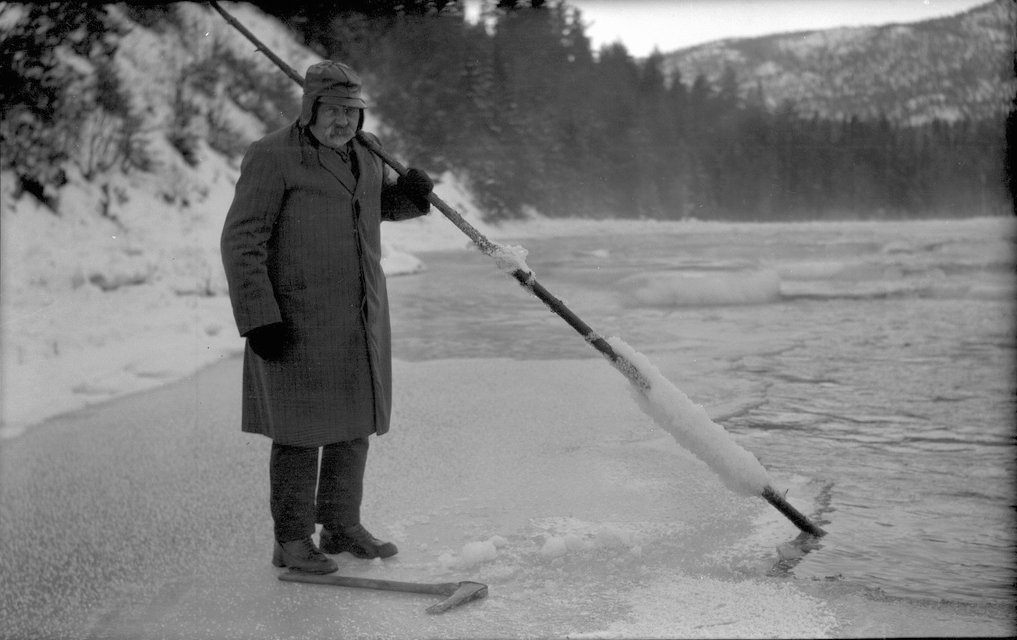 Isganger i Trysilelva, Engsa og Hanestad. Mann som måler sarrlaget. Vassdragsarkivet. Dato: 1927-1929